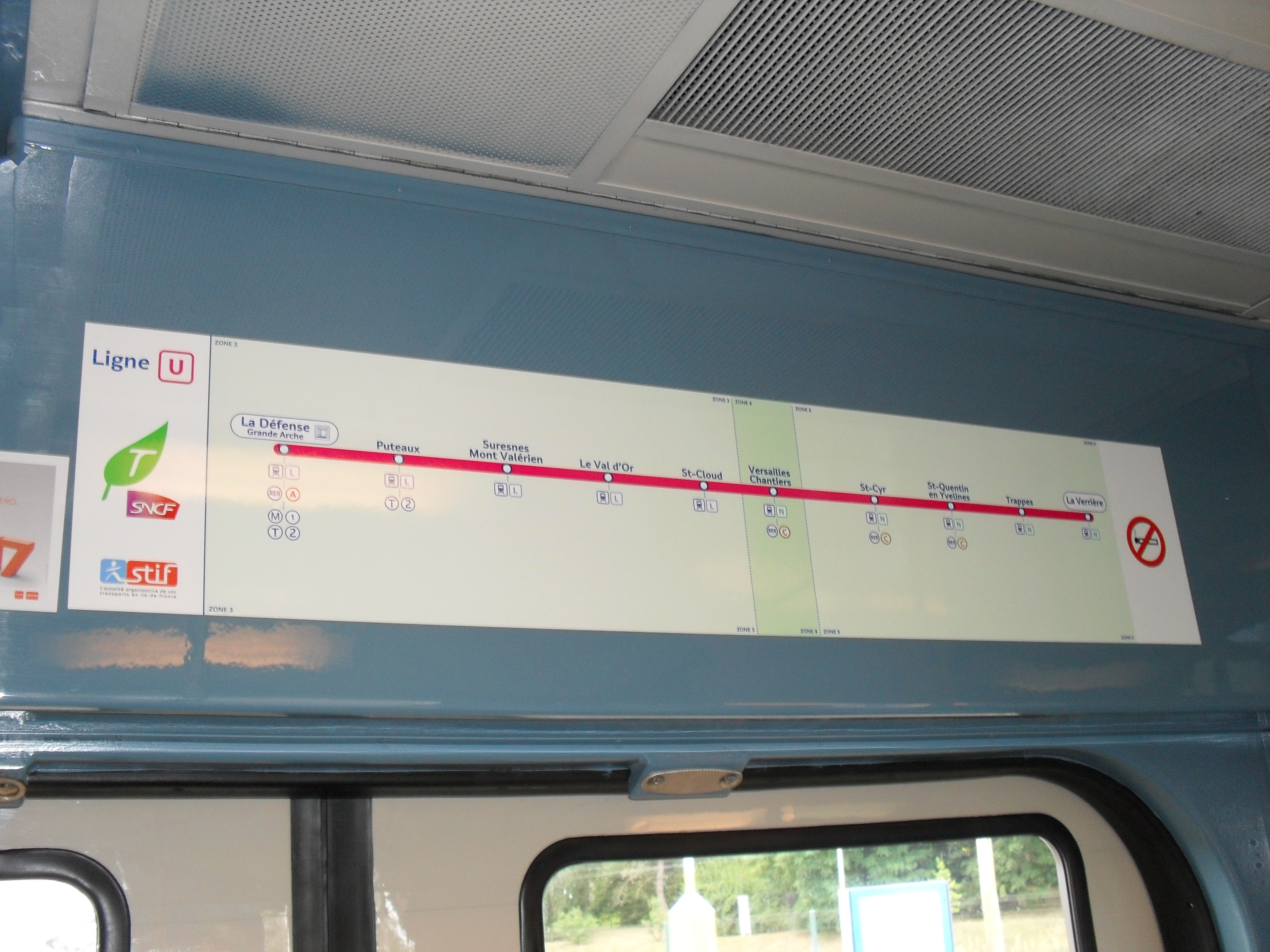 Intérieur d'une rame Z 8800 rénovée